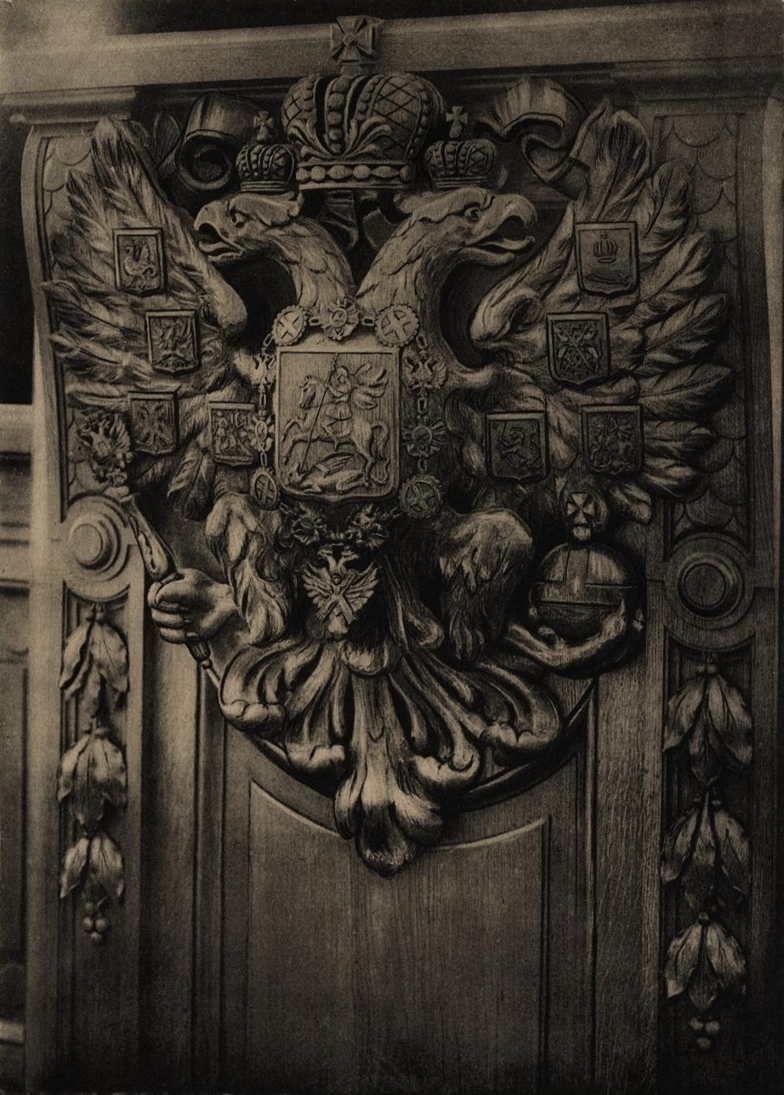 Герб на кафедре Государственной Думы.